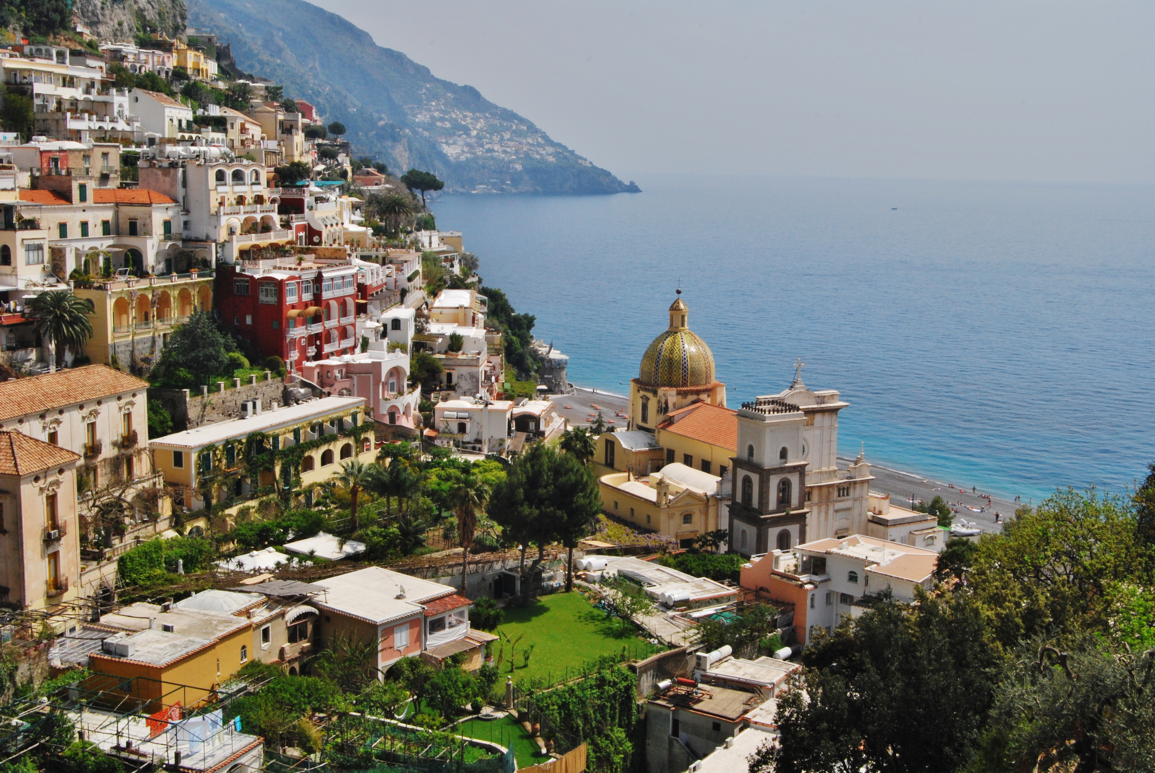 Вигляд узбережжя Позітано зі схилу. Посередині церква Санта Марія Ассунта.